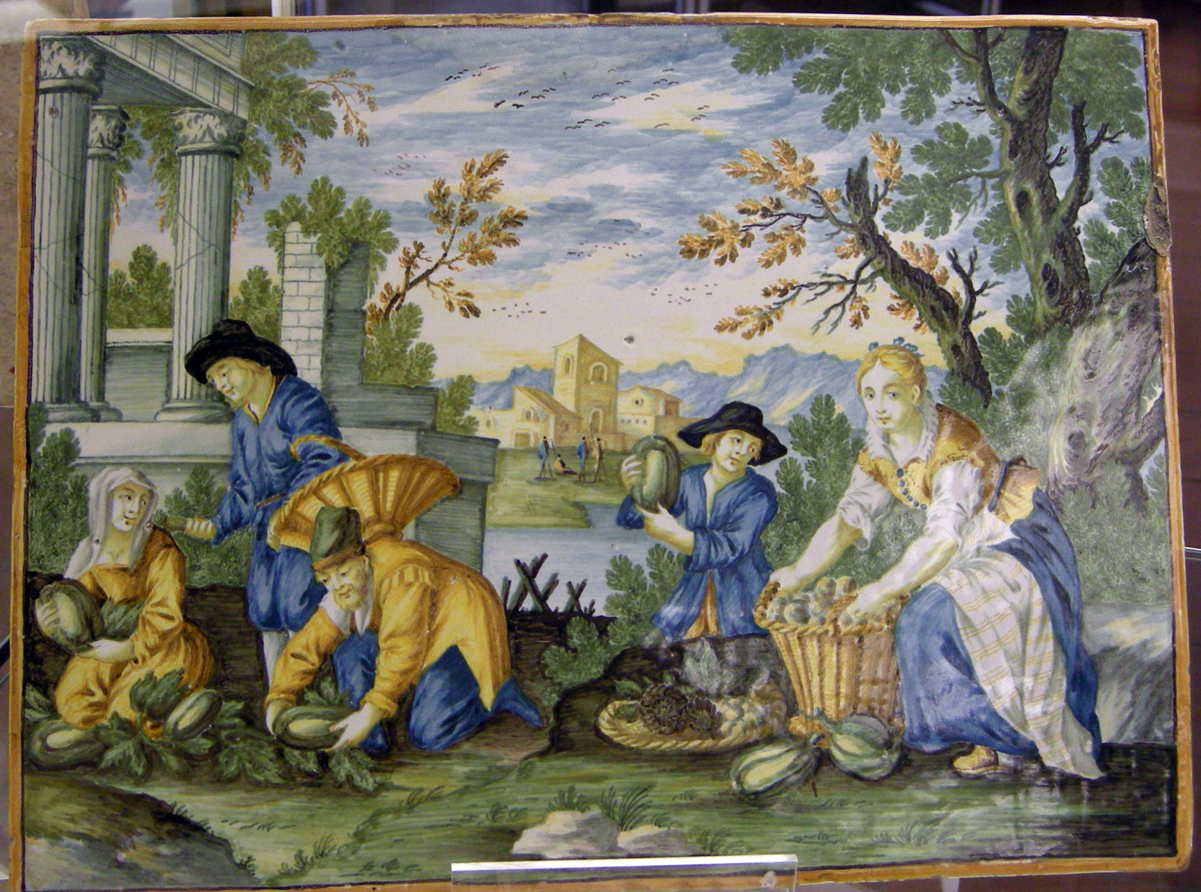 Palazzo Ducale di Urbino - Galleria Nazionale delle Marche - MIBAC This is a photo of a monument which is part of cultural heritage of Italy.